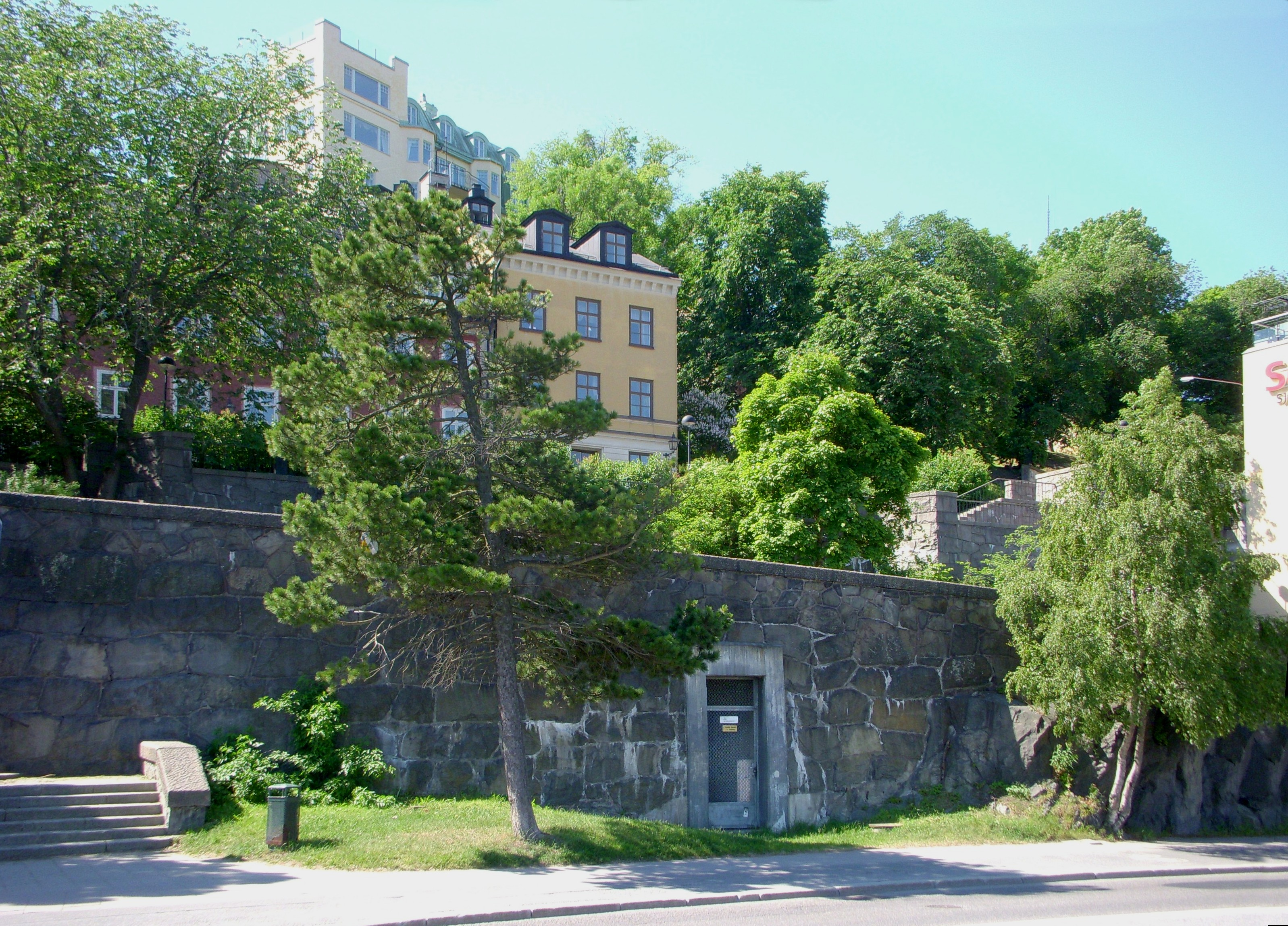 Katarinaberget på Södermalm, vy från Katarinavägen